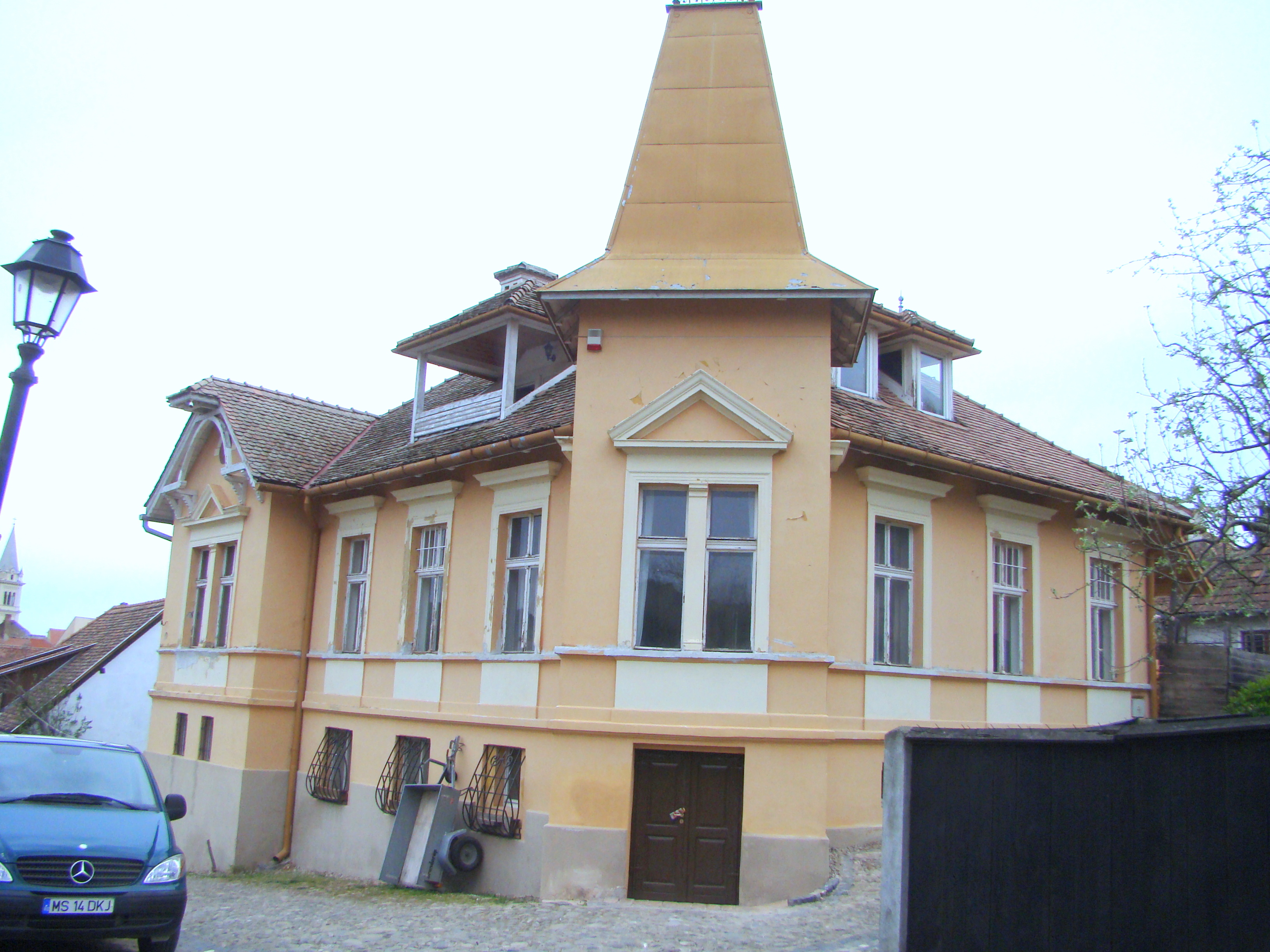 Casa Mureșan, municipiul Sighișoara, str. Zidul Cetății 5 1776, sec. XX